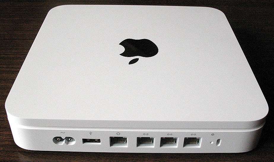 Apple Time Capsule. Вид сзади